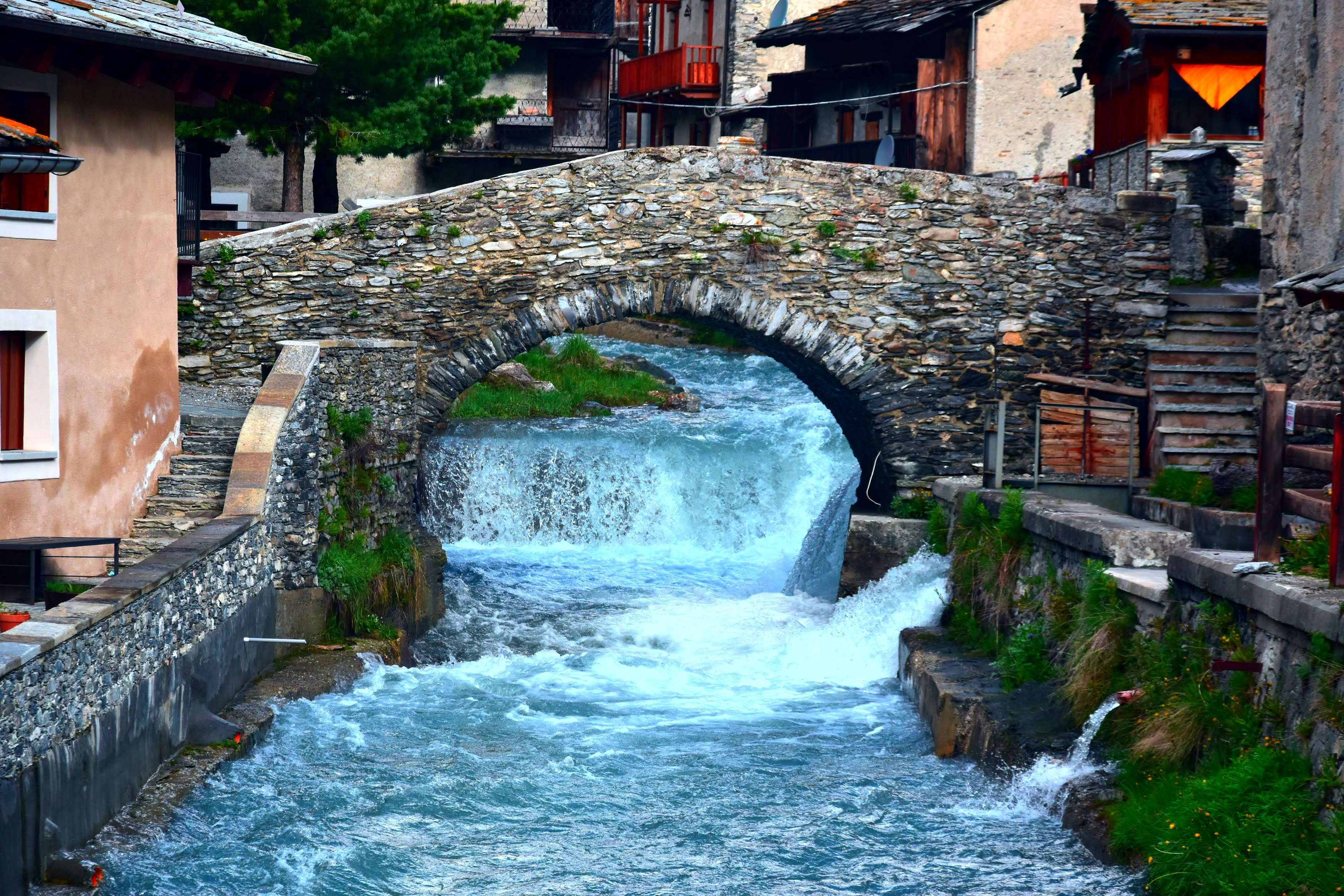 Parco del Monviso (Q47192508)